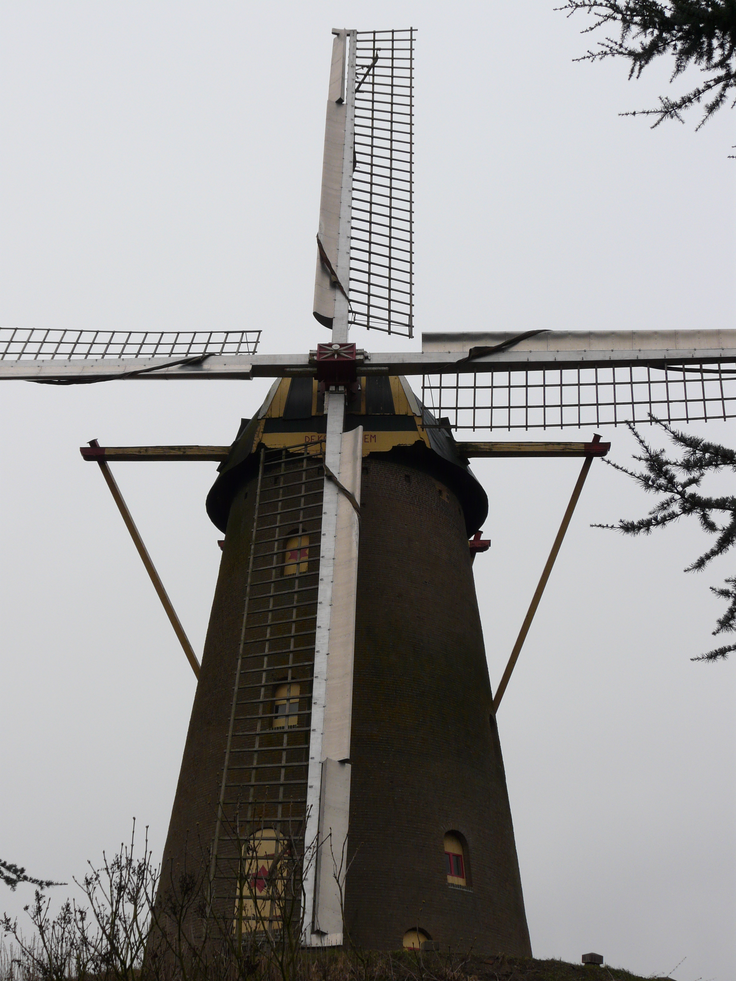 Molen De Korenbloem in Ulvenhout